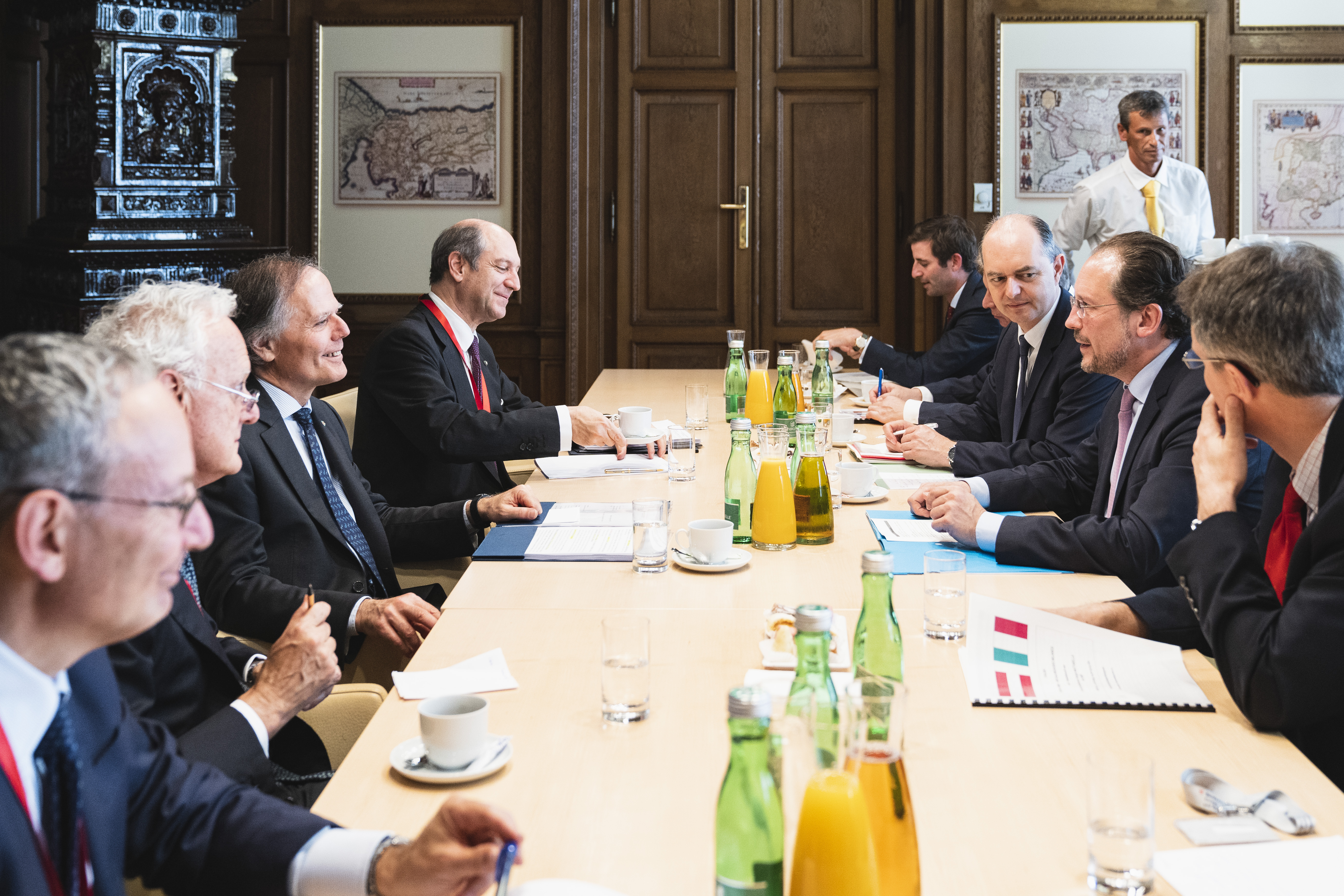 Besuch AM Enzo Moavero Milanesi bei HBM Schallenberg, Wien am 1. Juli 2019 Copyright: BMEIA/ Eugénie Berger